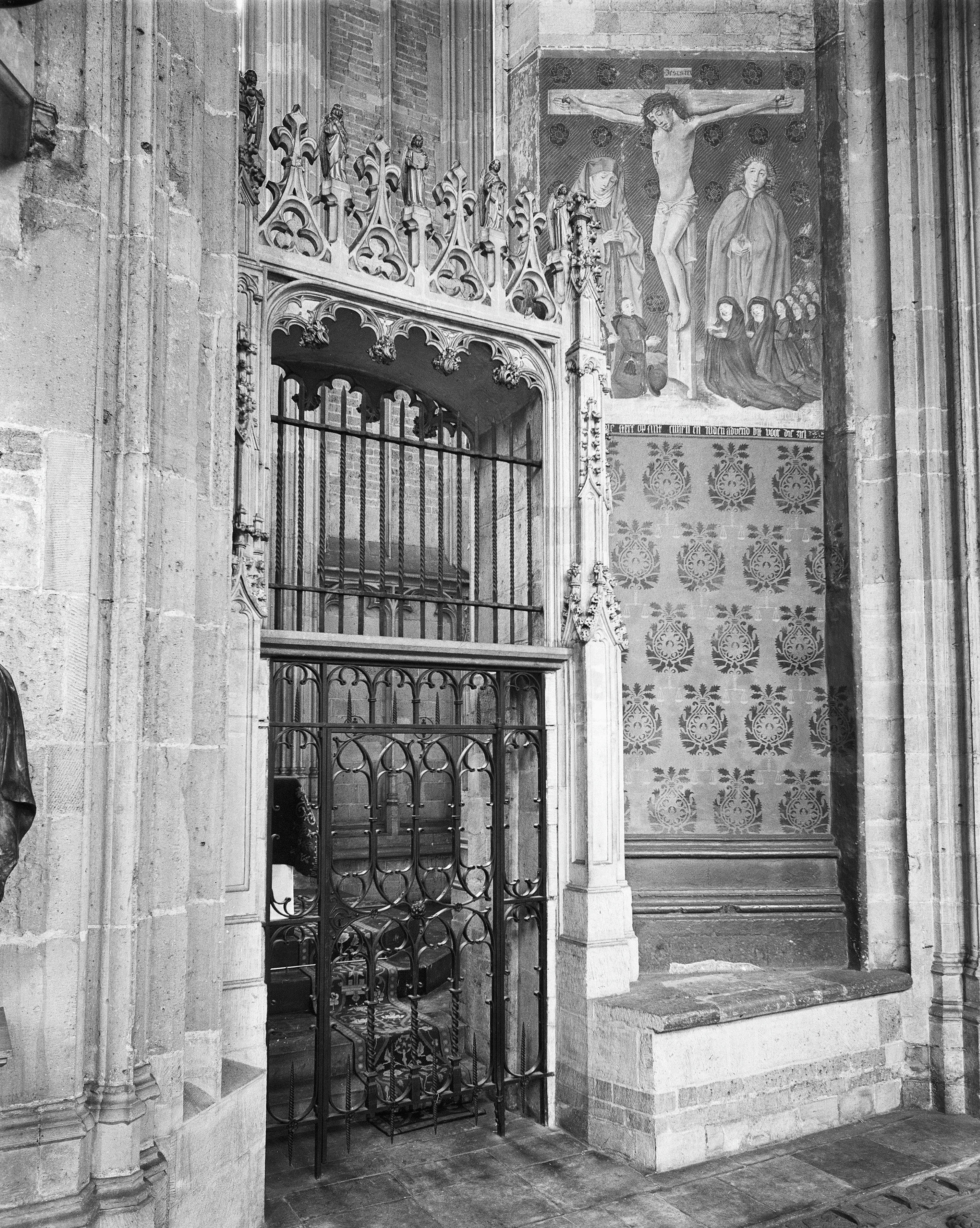 Sint Janskathedraal: zijingang St.Anth.kapel